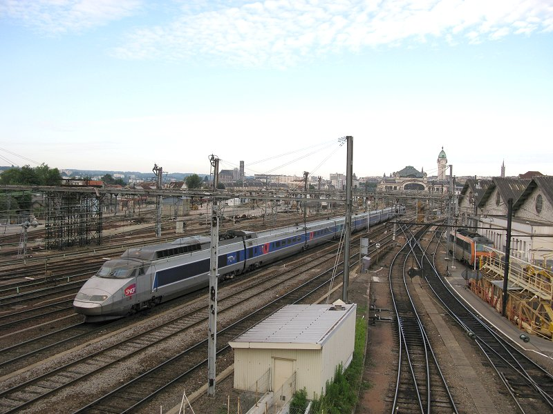 TGV Brive Lille en partance de la gare de Limoges Bénédictins